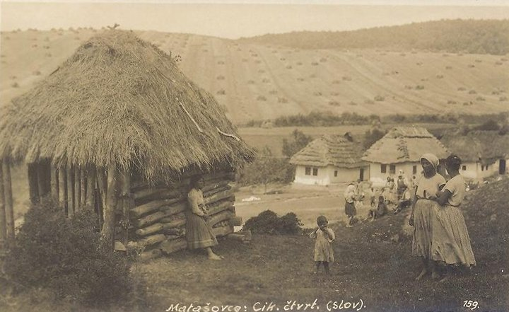 Cigánska osada v Matiašovciach na Zamagurí, na severovýchode Slovenska, pravdepodobne na začiatku 20. storočia.